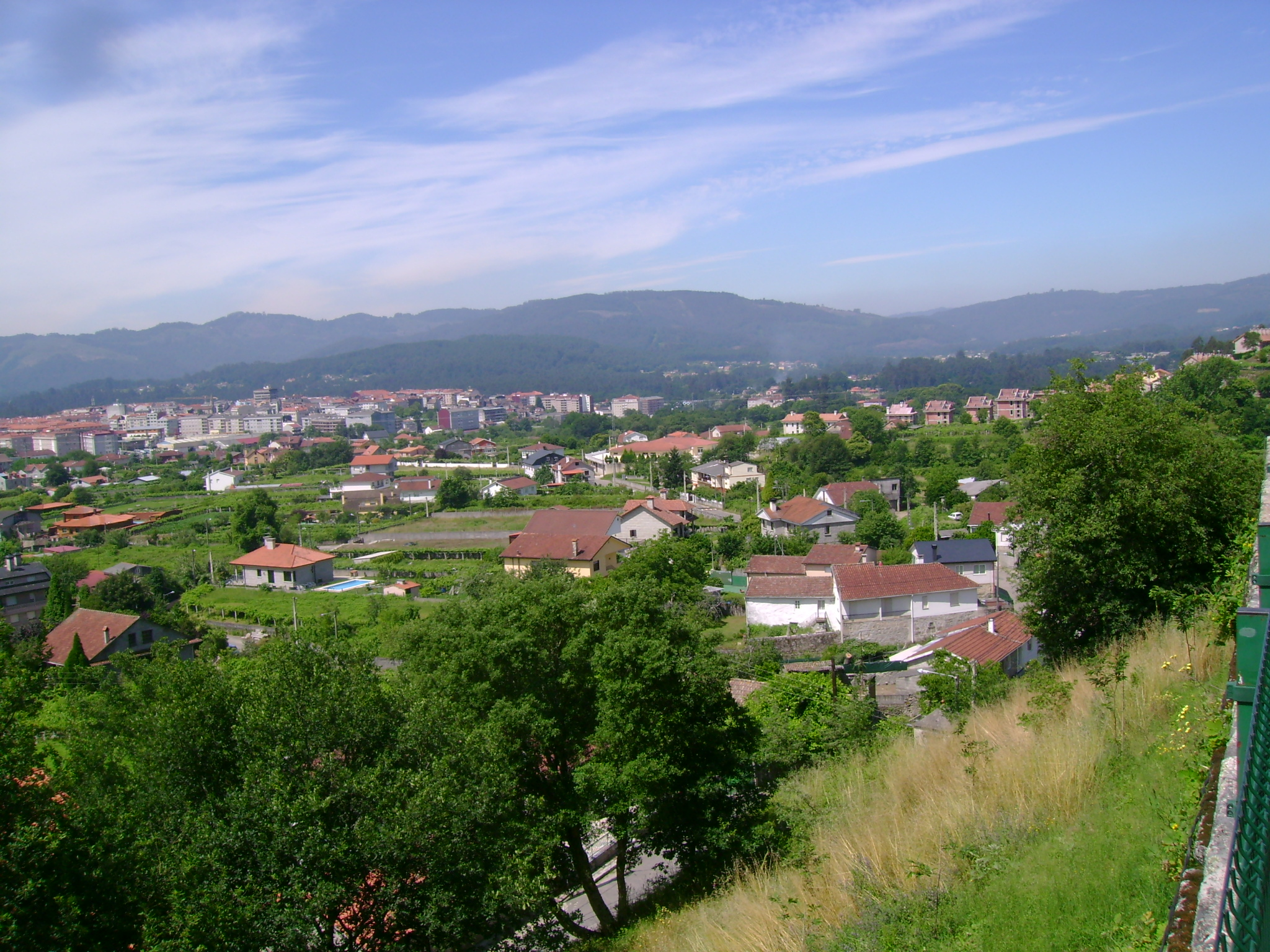 Vista desde el convento de Canedo sobre Ponteareas